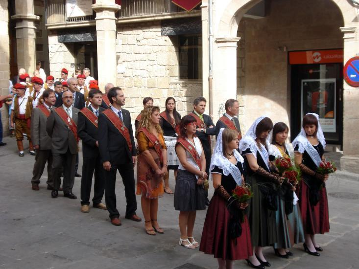 Baixada a la Catedral de la Corporació Municipal de Solsona durant la Festa Major de 2008 al seu pas per la plaça Major.